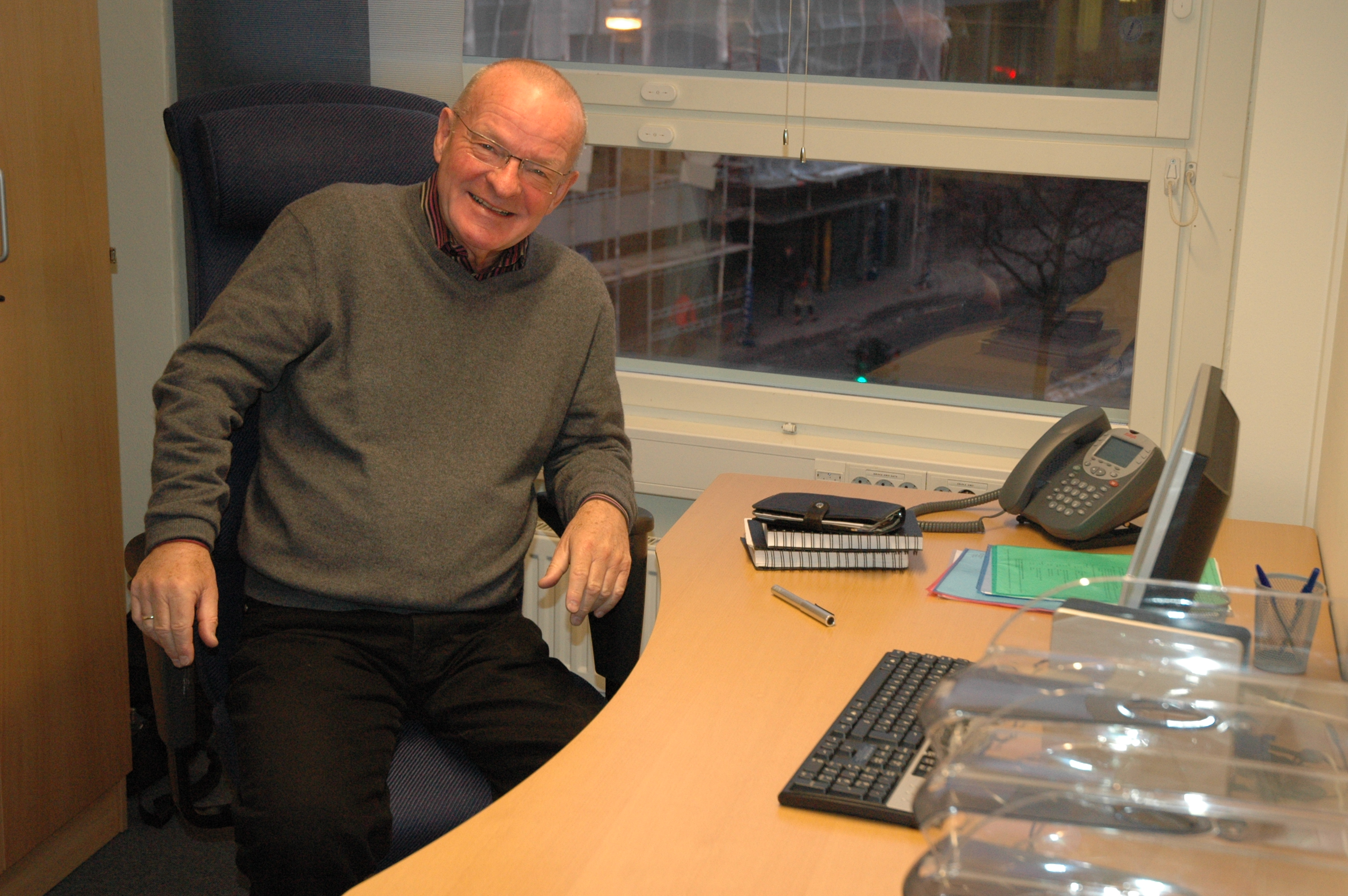 Geir Gundersen ved kontorpulten i Storgata 38, Oslo (Blå Kors' hovedkontor) som seniorrådgiver i januar 2011.